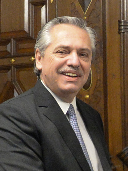 El presidente Mauricio Macri se reunió con el presidente electo, Alberto Fernández, en la Casa Rosada.